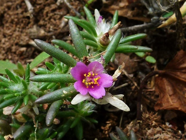 Shaggy Portaluca/Moss Rose - Portulaca mundula Family: Portulacaceae